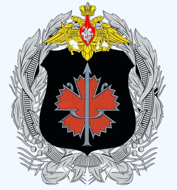 эмблема центра зарубежной информации